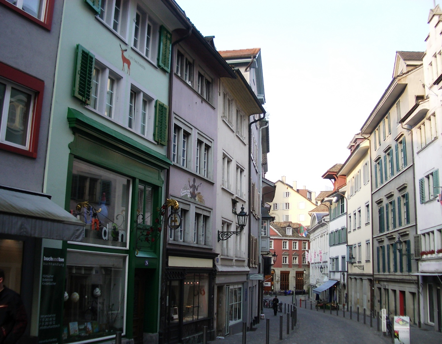 Neumarkt Zürich, Switzerland self-made, April 2006